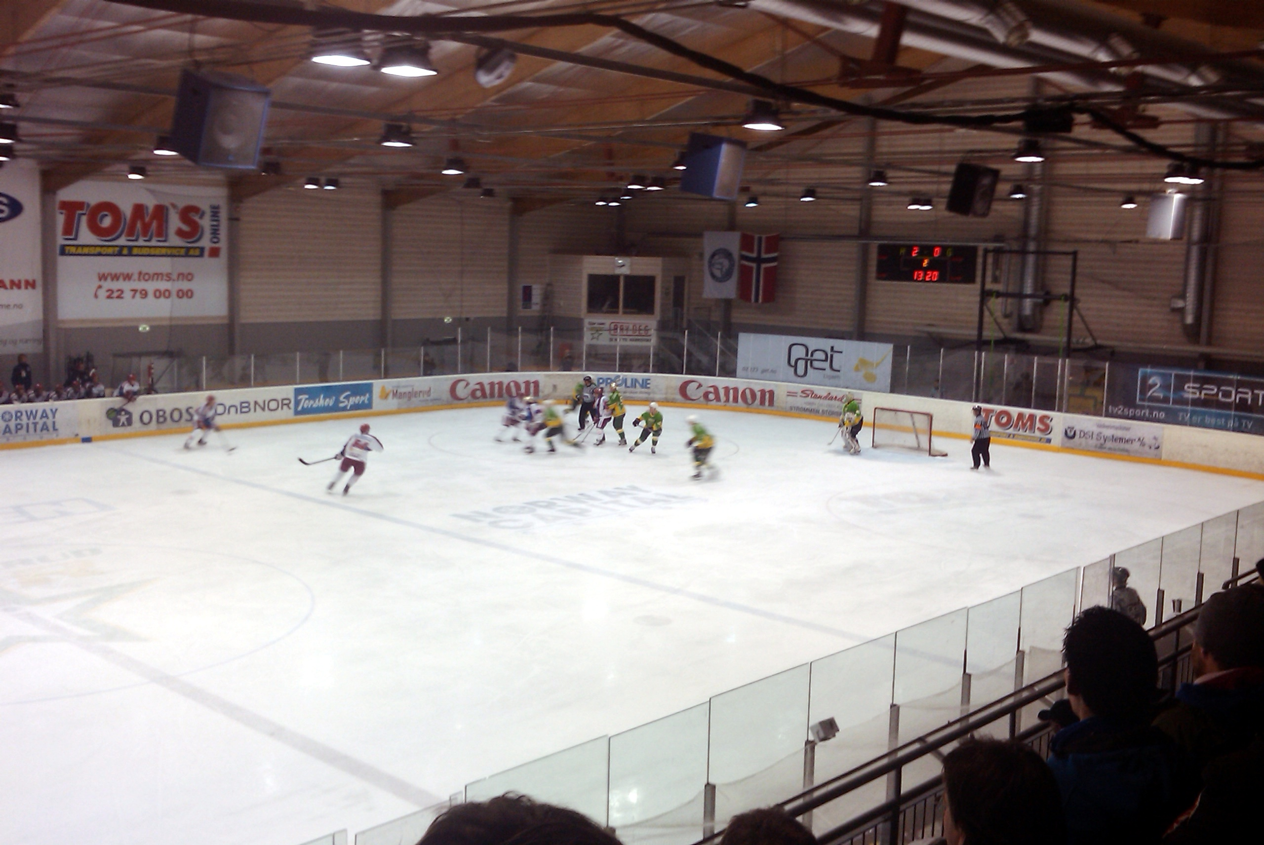 Fra M/S-VIF, kvartfinale i NM i ishockey 2010.